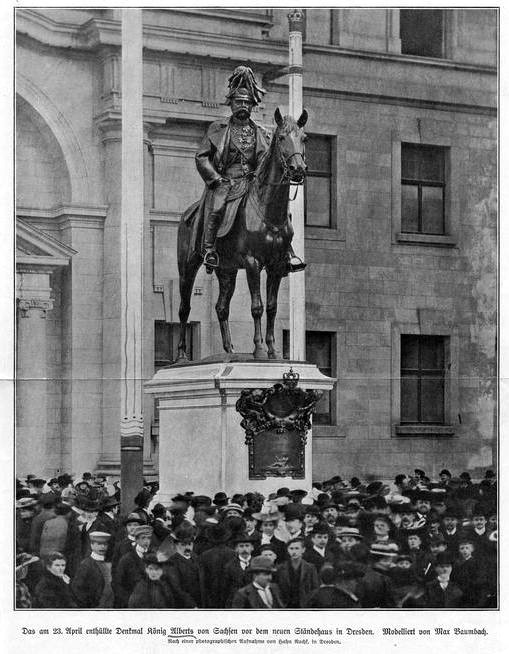 Das am 23. April 1906 enthüllte Denkmal König Alberts von Sachsen vor dem neuen Ständehaus in Dresden. Modelliert von Max Baumbach